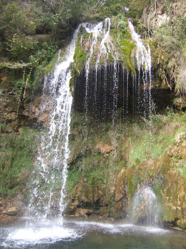 Водопад Велики бук (Лисине), на Бељаници